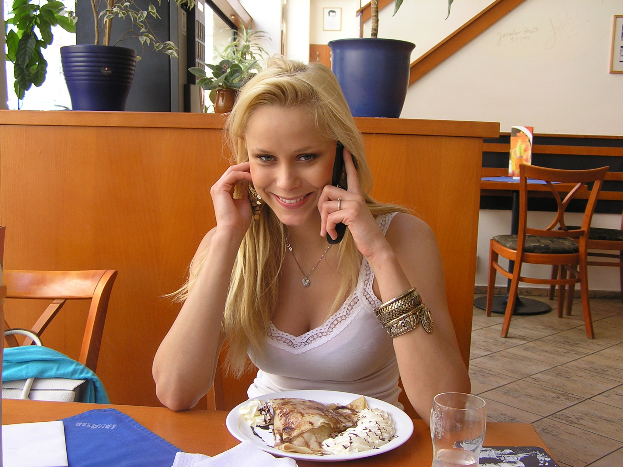 Supermodel - Júlia Liptáková - from Slovakia.